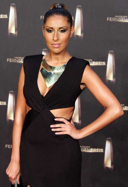 Senna Guemmour beim Deutschen Fernsehpreis 2012